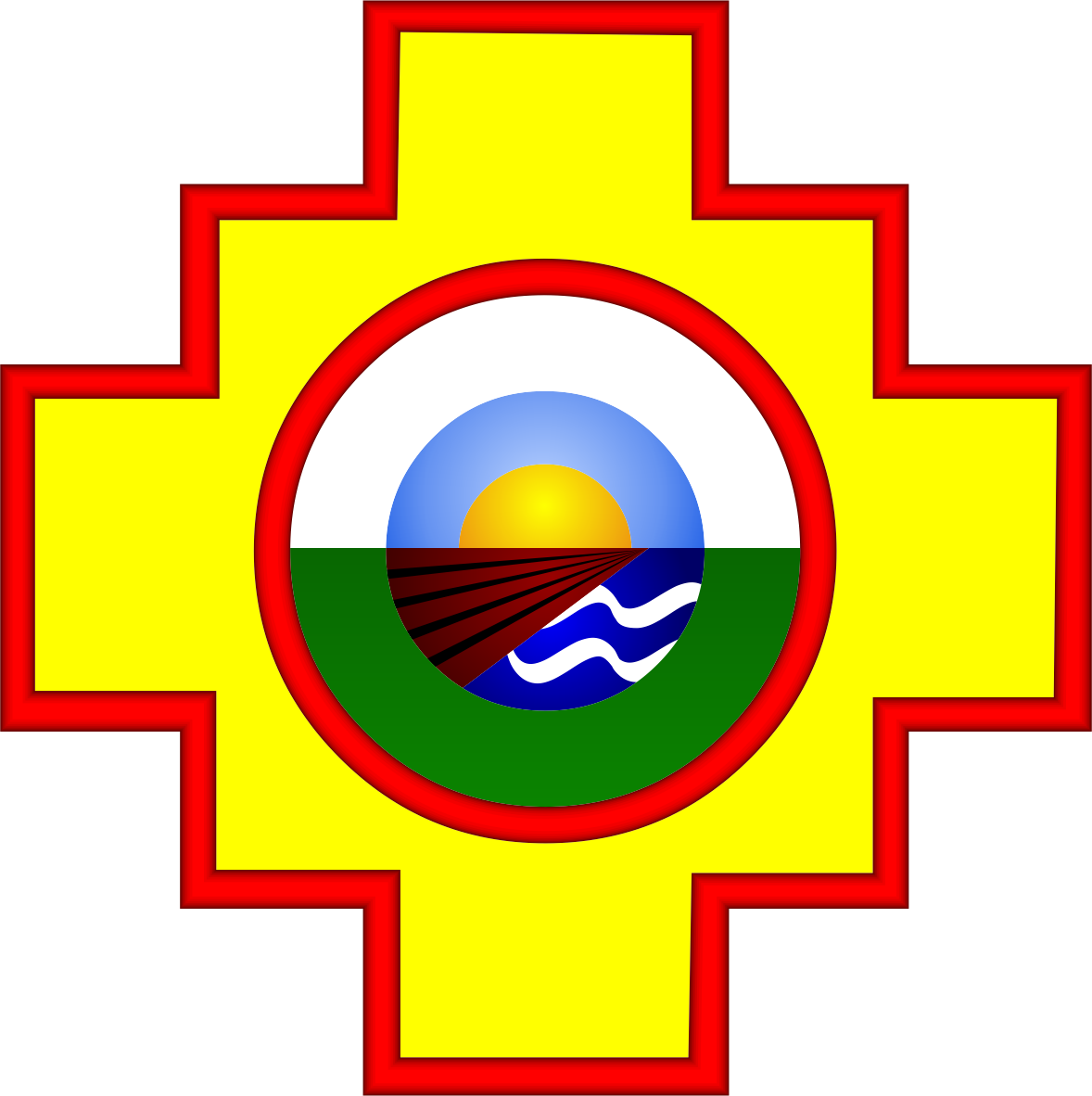 Distrito de Acora - Provincia de Puno - Región Puno